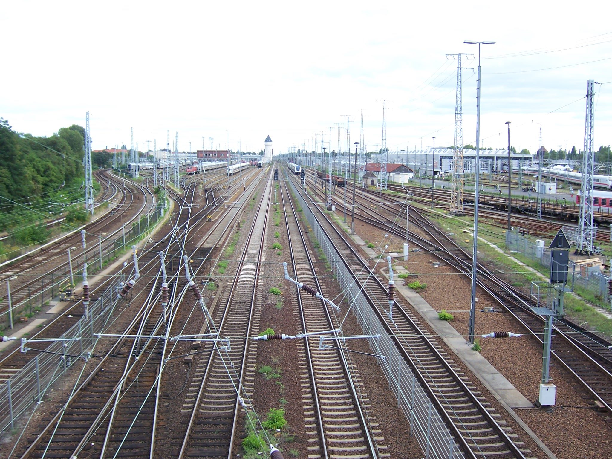 Betriebsbahnhof Berlin-Rummelsburg, Blick nach Osten